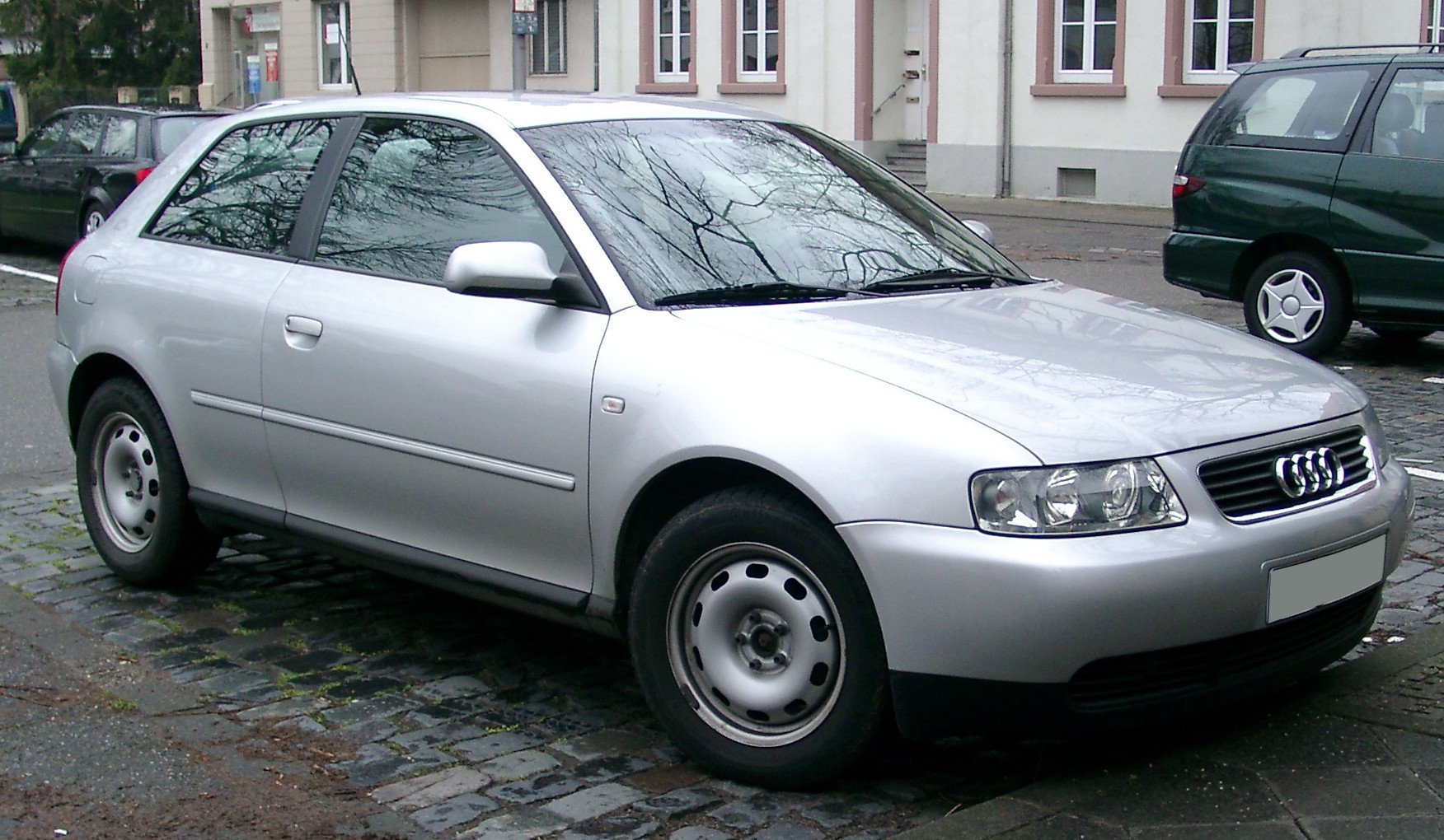 Audi A3